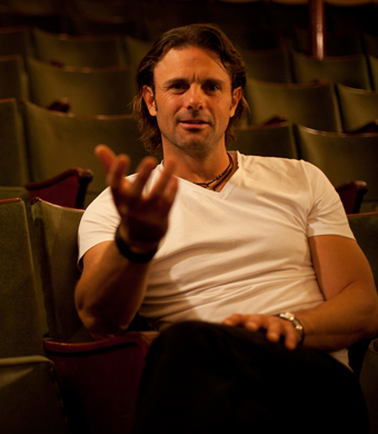 Raymond föreläser om personlig utveckling utifrån samma filosofiska grundtankar som Eckhard Tolle, Anthony Robbins och Wayne Dyer.